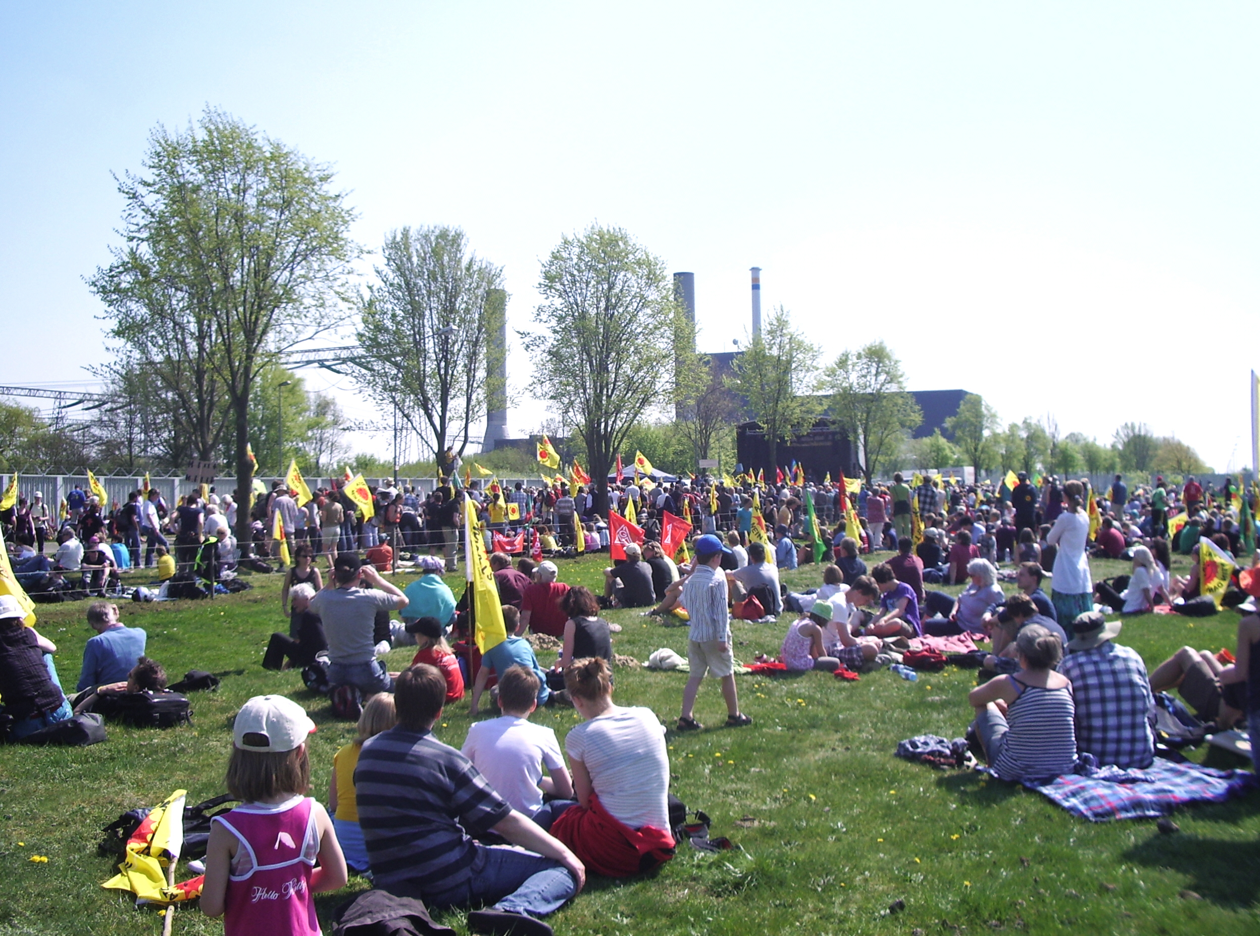 Beginn der Demo von dem Atomkraftwerk Brunsbüttel